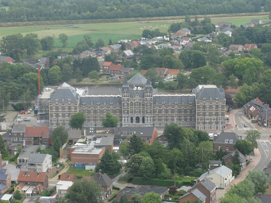 Het Heilig-Hartcollege te Maasmechelen